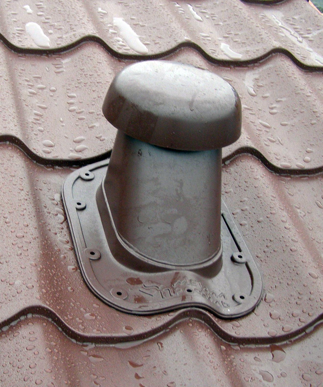 Вентиляционный выход одного из ведущих российских производителей тонколистовых кровельных и стеновых материалов ГК Металл Профиль